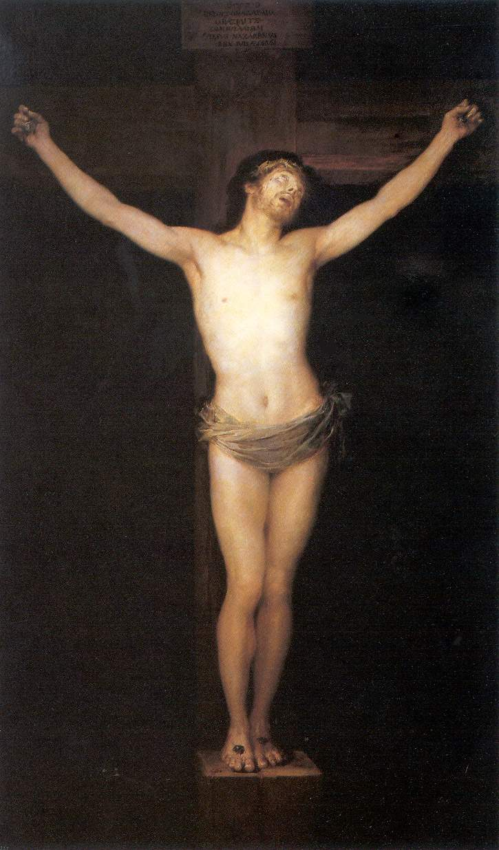 Cristo crucificado